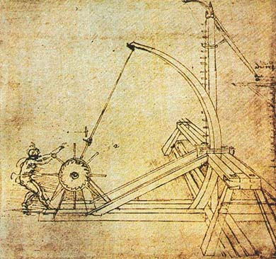 Катапульта с лебёдкой (рисунок Леонардо да Винчи)